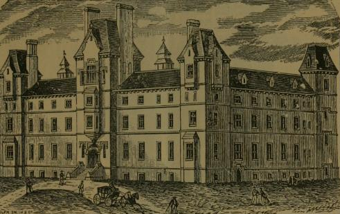 Toronto General Hospital Caption Original Hospital 1854 - 1878